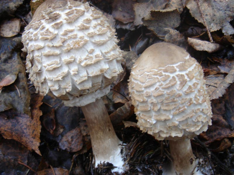 Macrolepiota rhacodеs